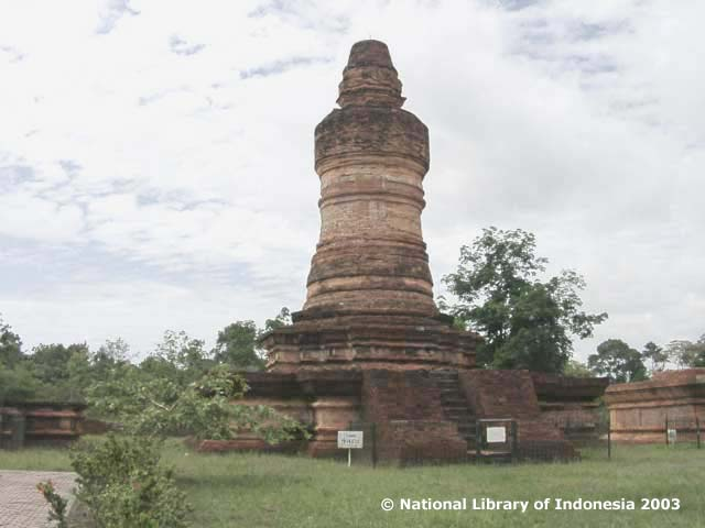 Muara Takus temple, Sumatra, Indonesia